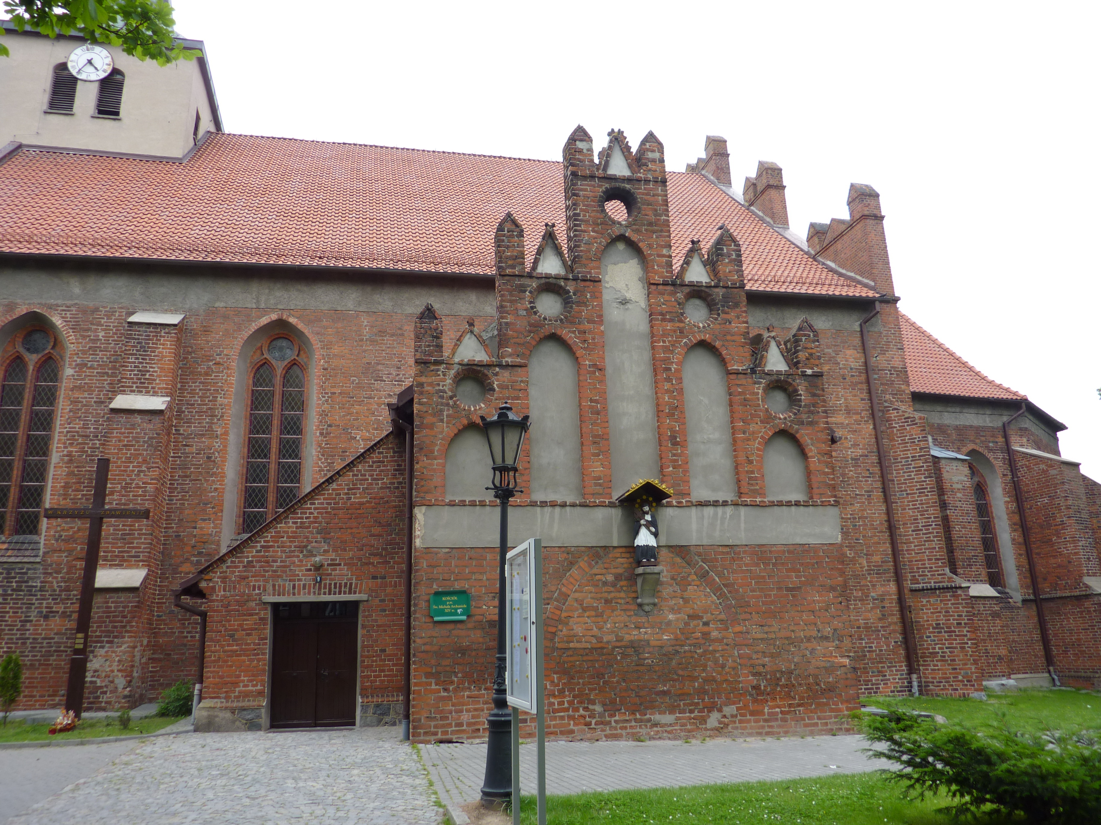 Kościół parafialny pw. św. Michała Archanioła w Skarszewach.